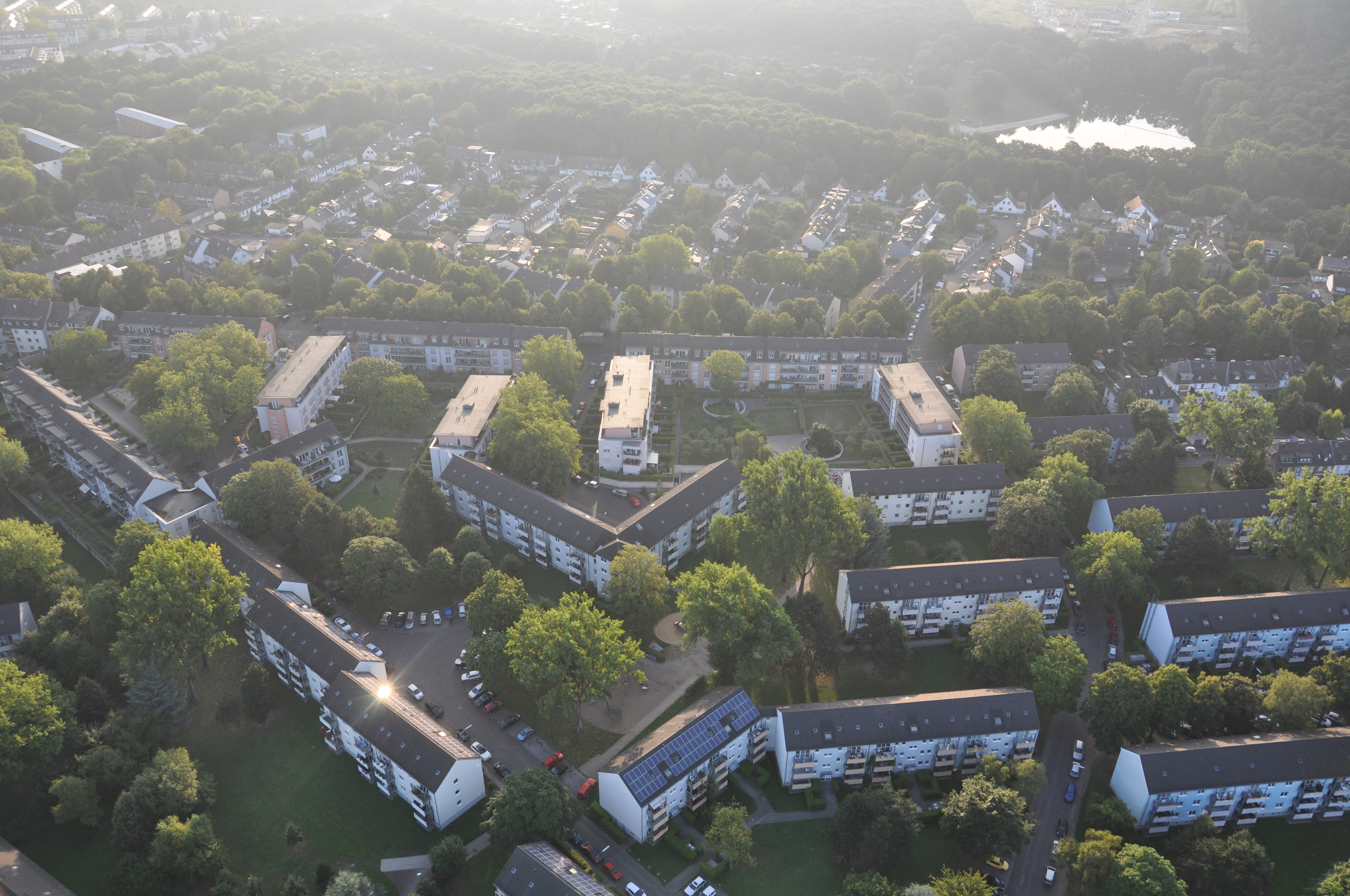 Ballonfahrt Köln. GAG-Siedlung „Vingst II“ zwischen Sibelius- und Kuthstr. in Köln-Vingst. Am oberen Bildrand die Einfamilienhaussiedlung am Marbergweg und das Städtische Naturfreibad Vingst.